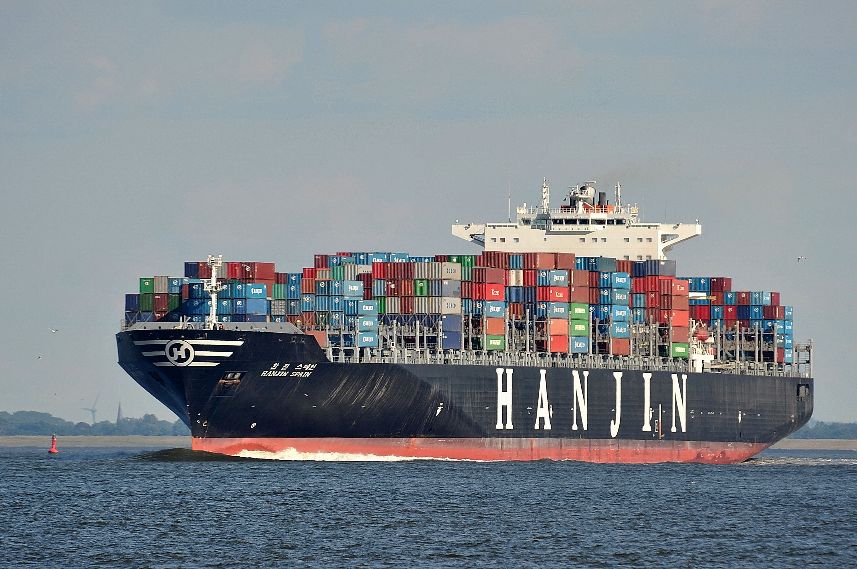 Von Hamburg kommend vor Cuxhaven in richtung See